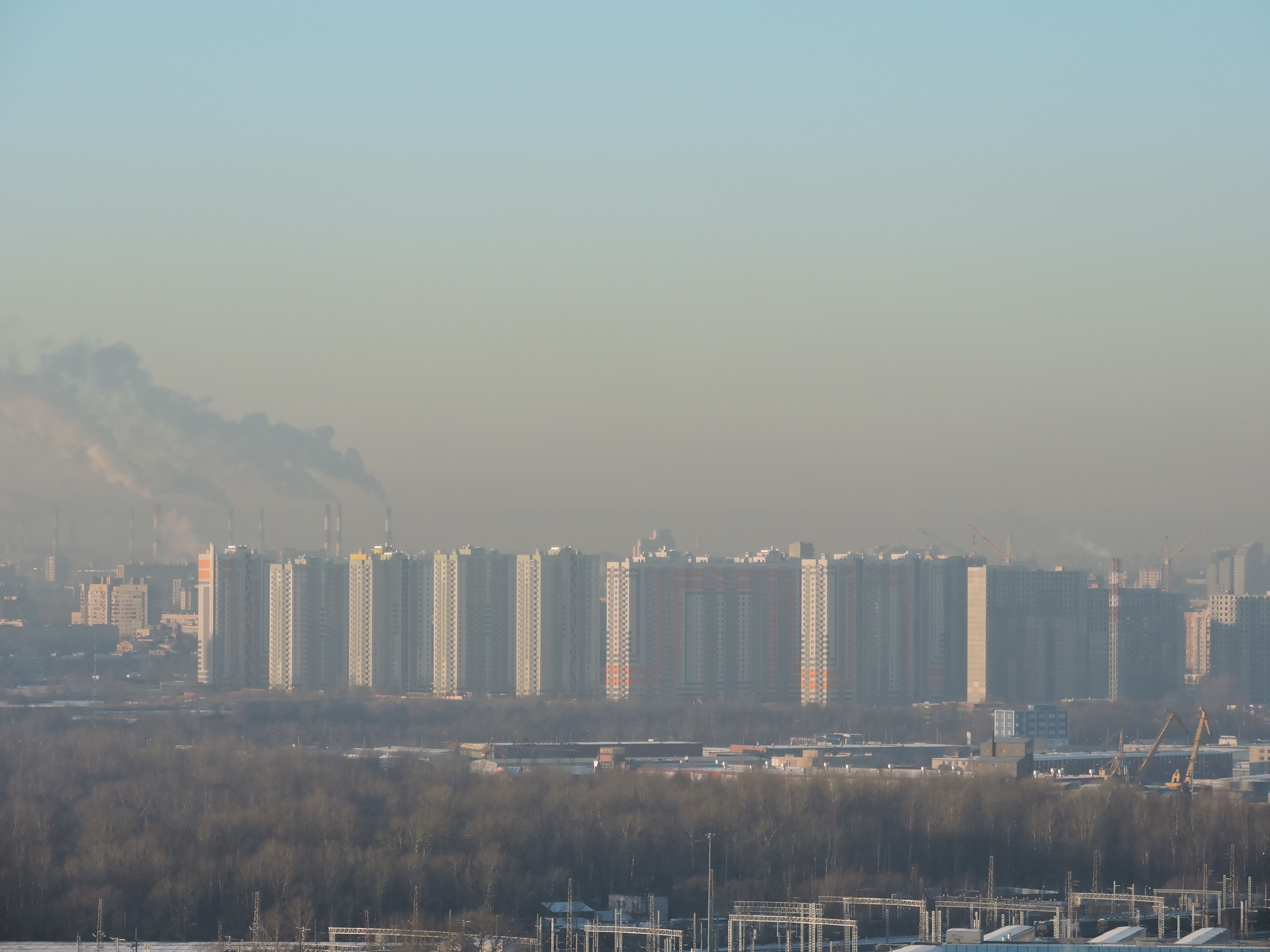 Вид с 35-этажа на ЖК «София» в Купчино (4,7 км)